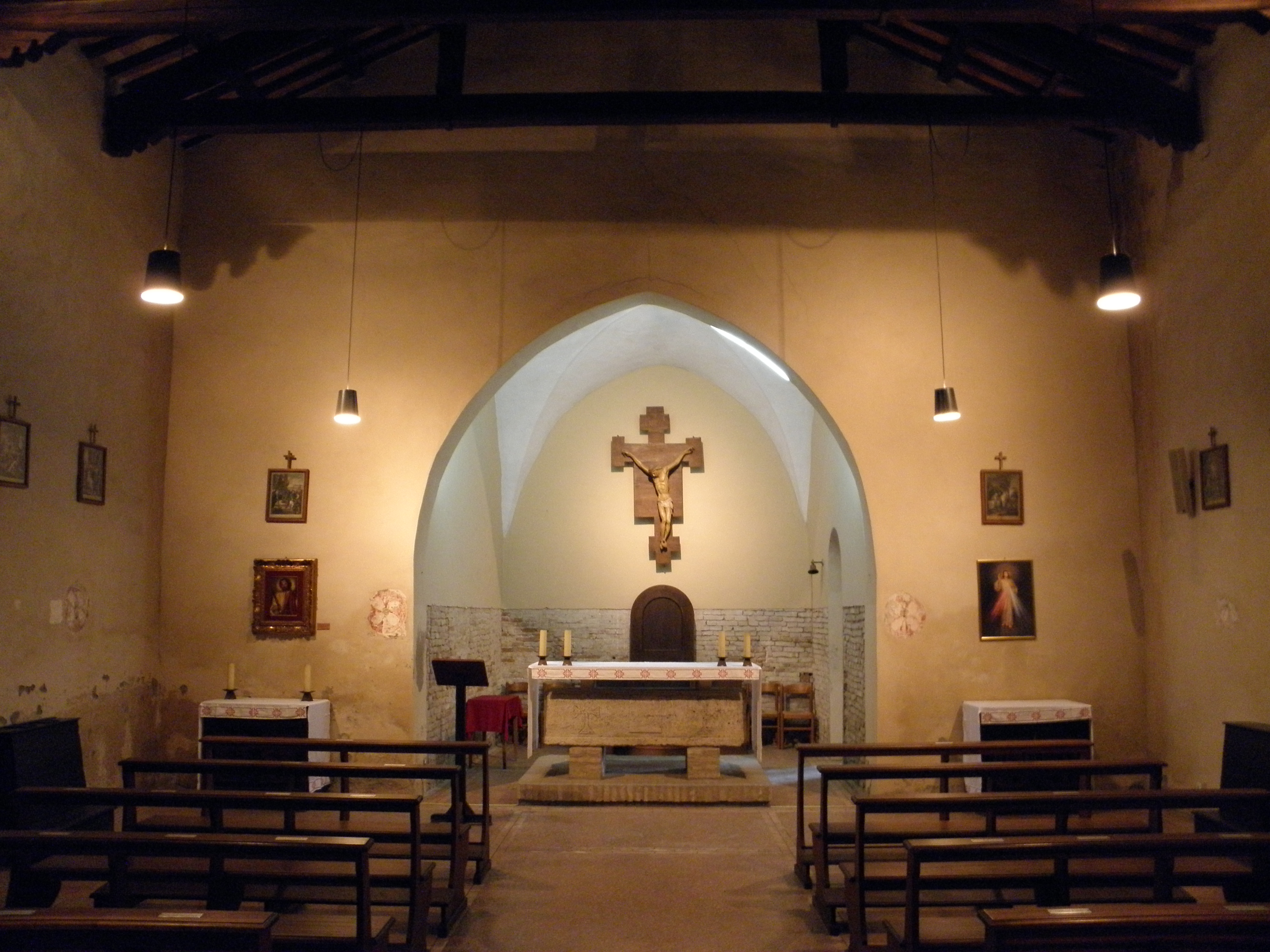 Cervia, santuario della Madonna del Pino: interno, altare maggiore.